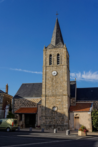 Église Saint-Maixent de Geay .